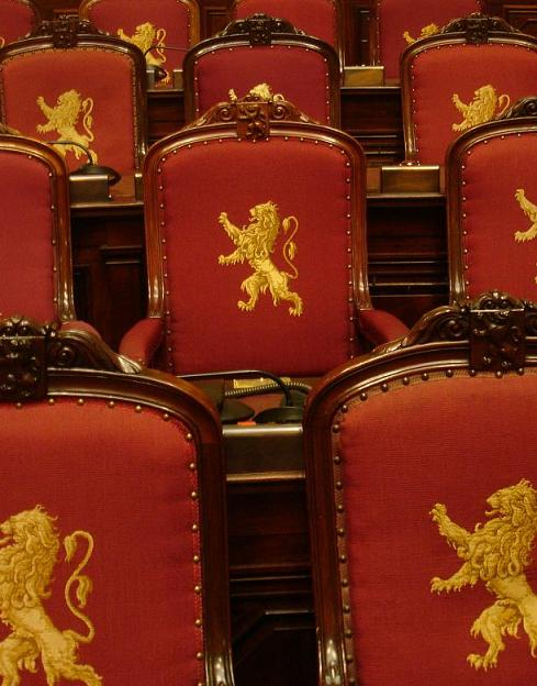 Senaat